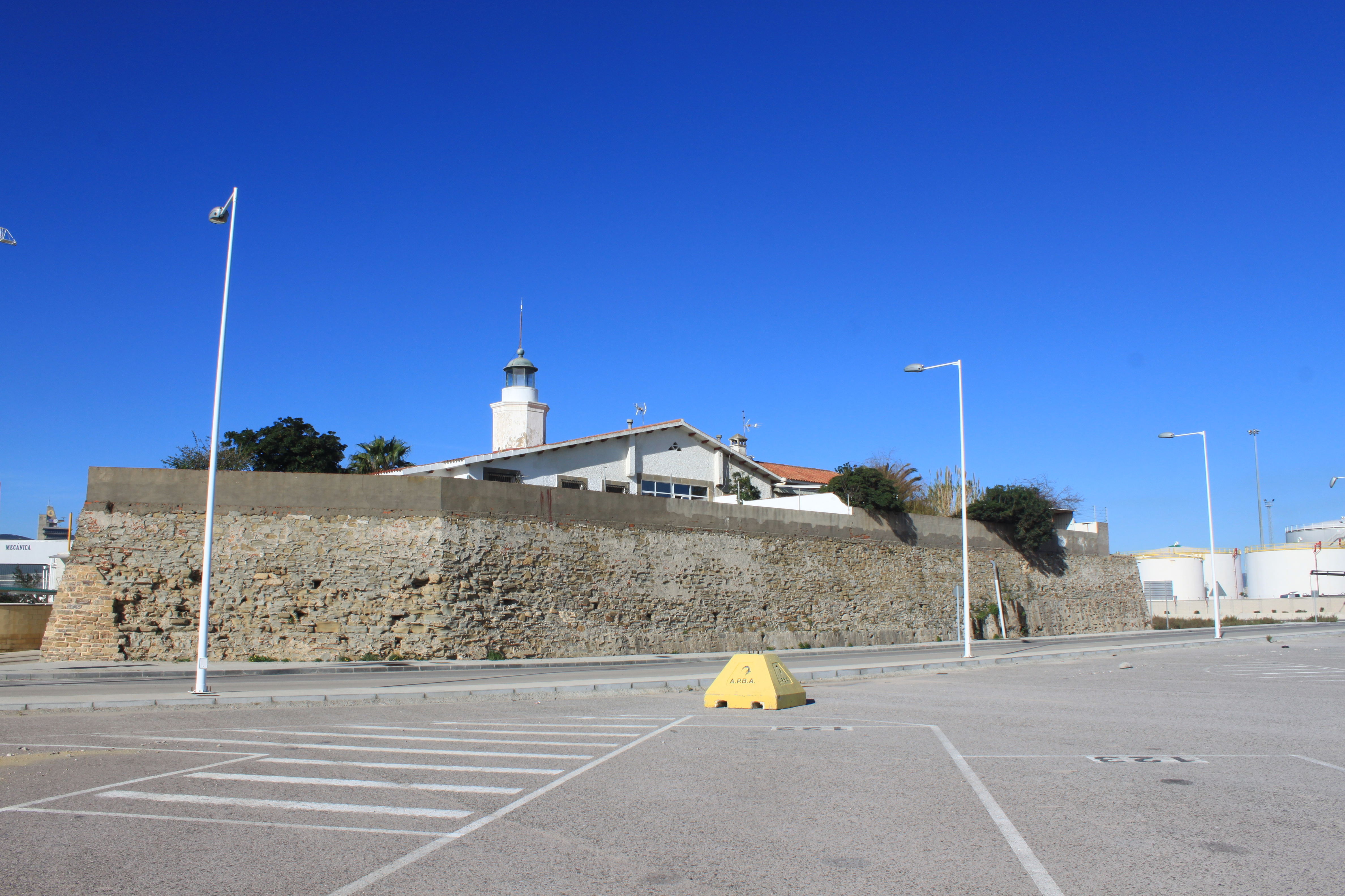 Restos del Fuerte de Isla Verde, en el interior de las instalaciones del Puerto de Algeciras. Algeciras, Andalucía, España.